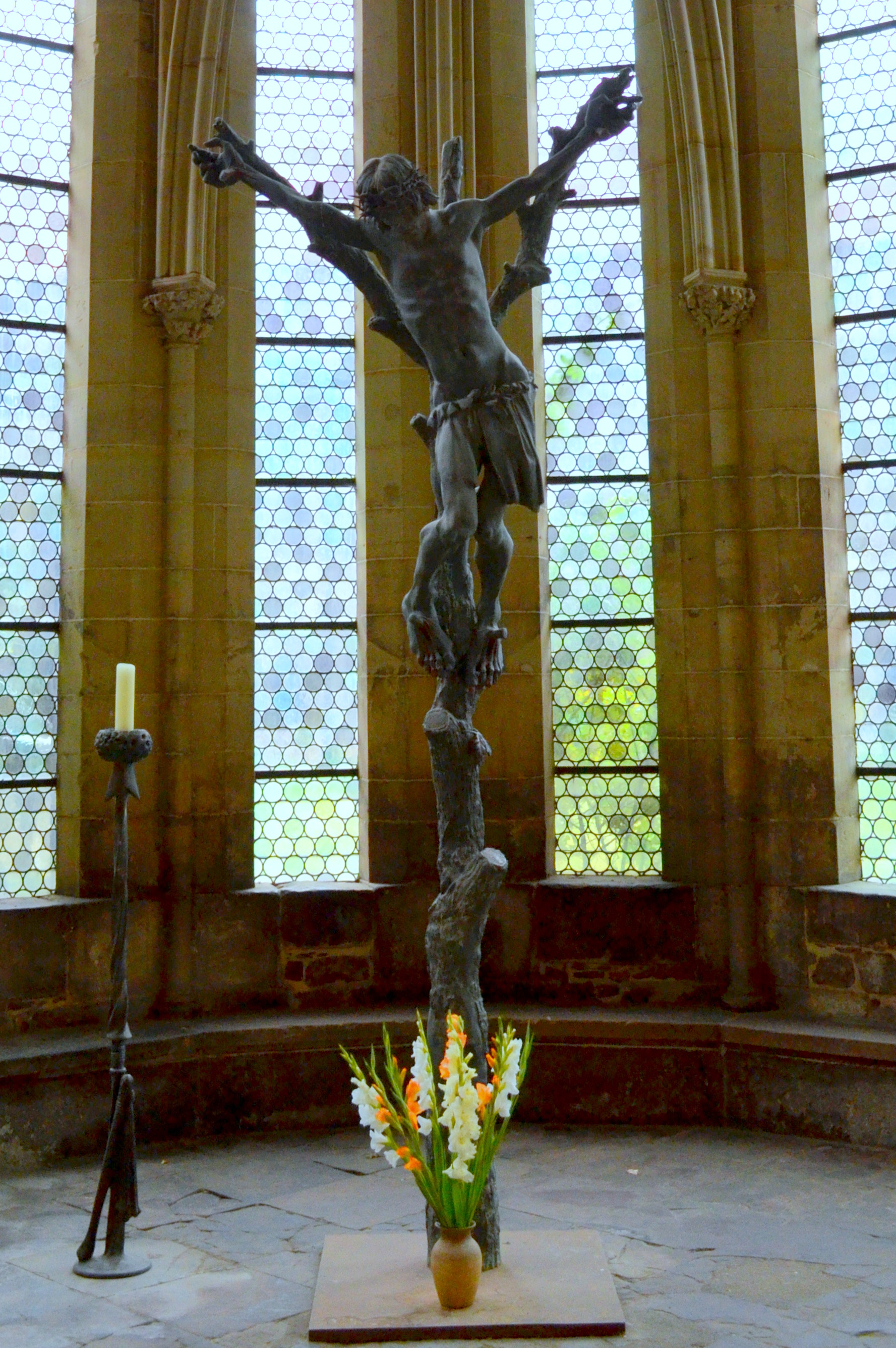 Domkerk van Maagdenburg, crucifix